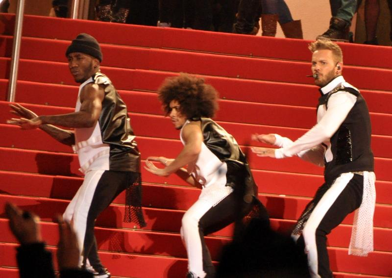 M. Pokora aux NRJ Music Awards